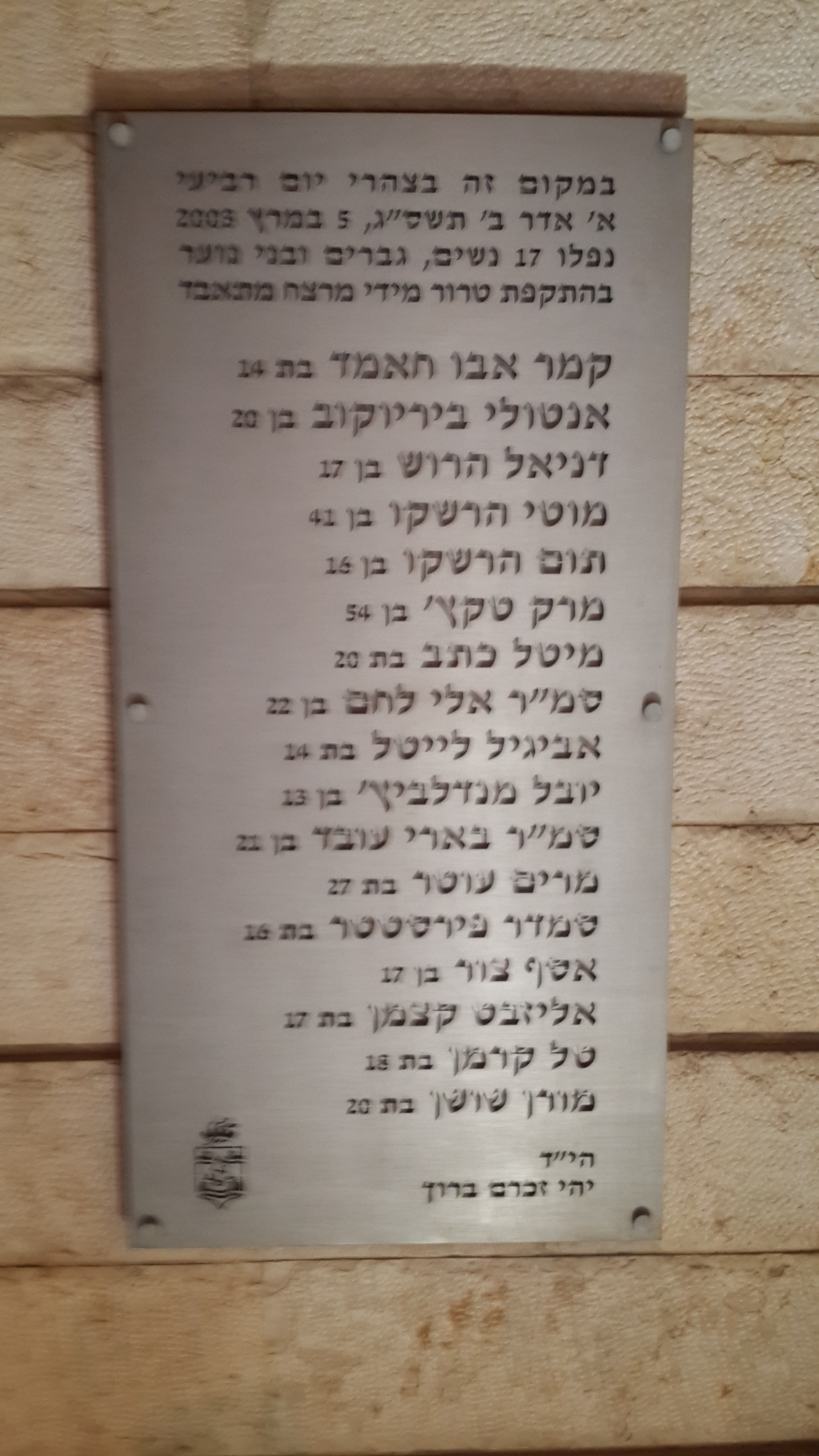 האנדרטה לזכר נרצחי הפיגוע בקו 37 בחיפה